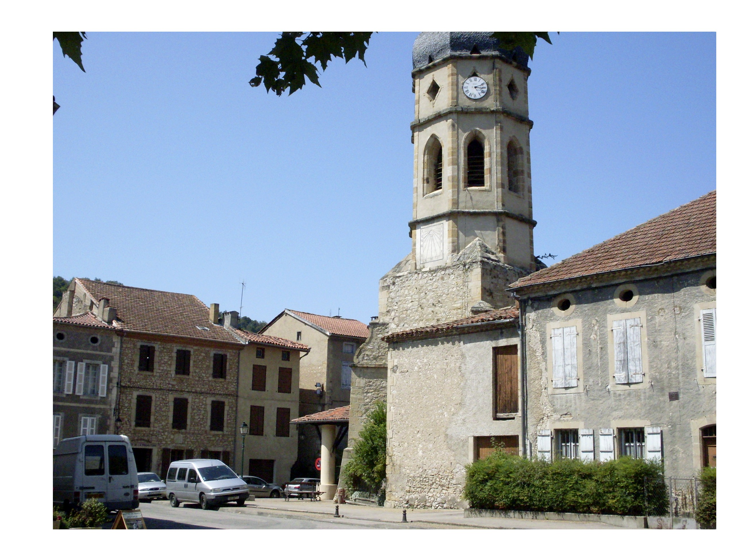 Le Mas-d'Azil, Ariège, France.